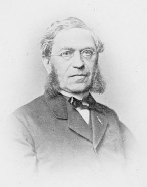 Bernhard Hirschel (1815–1874), deutscher Homöopath